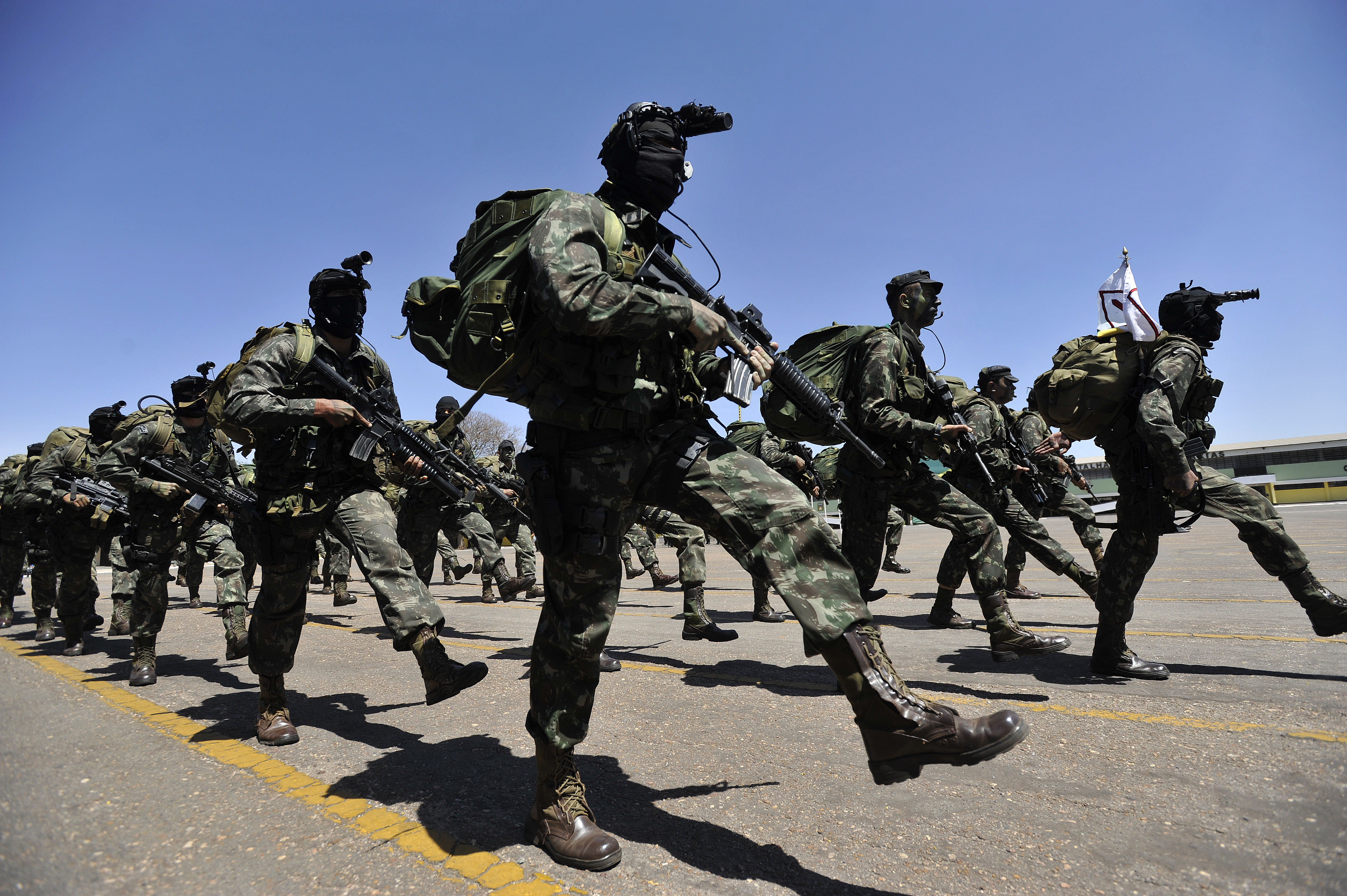 Brasília, 06/09/2012 Foto: Felipe Barra